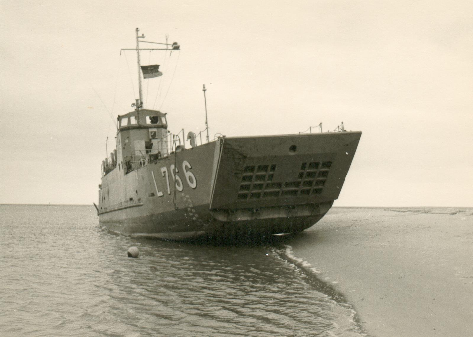 Landungsboot bei Esbjerg auf Grund gelaufen F.Lang eig.Bild 1966